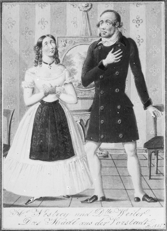 Schwarz-Weiß-Foto eines Aquarells von Johann Christian Schöller (1782-1851): Das Mädel aus der Vorstadt. Nestroy zusammen mit Maria Weiler.